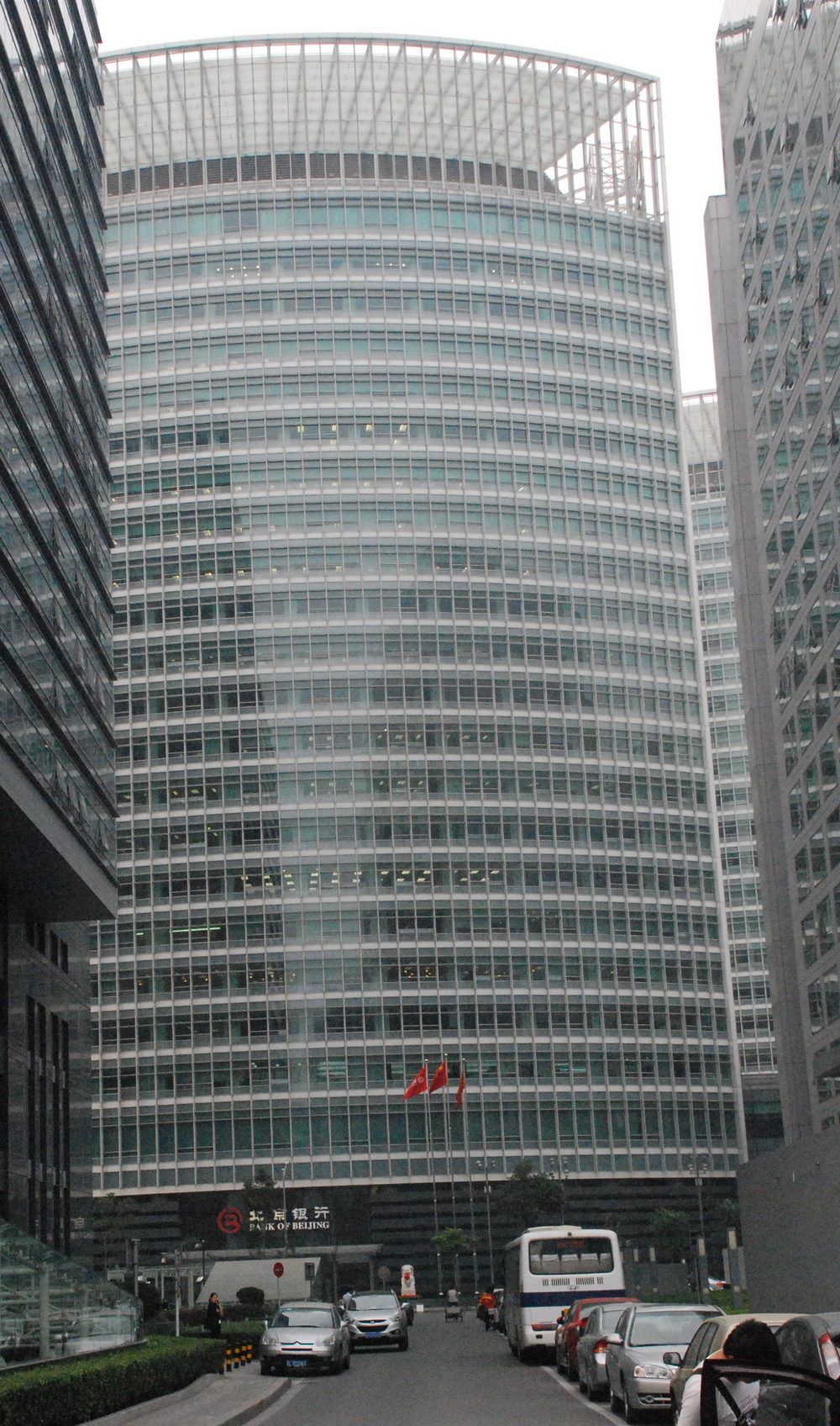 北京银行